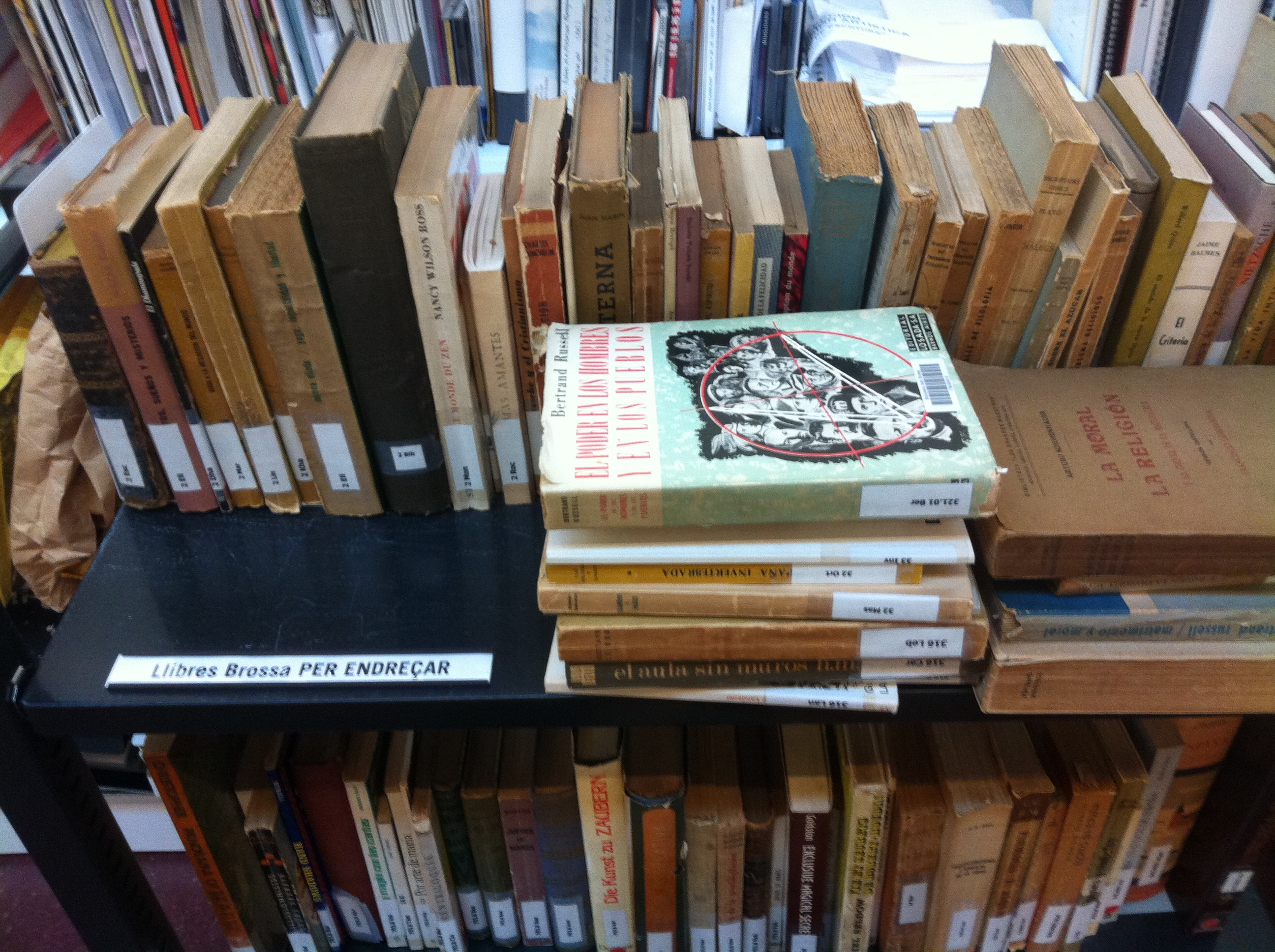 Fons Joan Brossa pendent de ser catalogat al Centre de Documentació del MACBA.